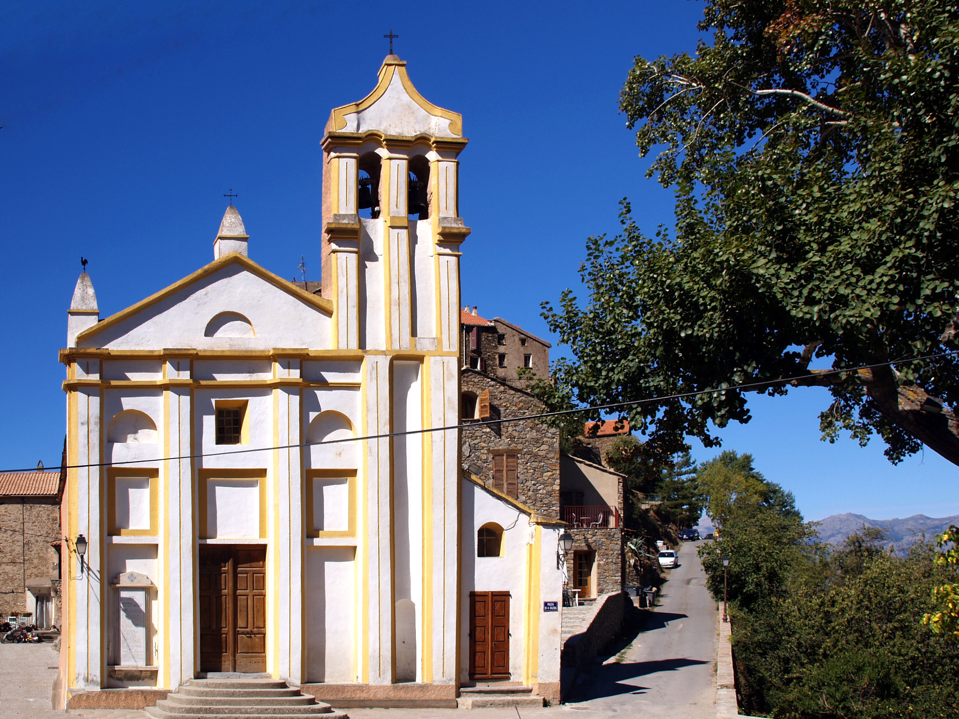 Tralonca, Bozio (Corse) - L'église San Bernardinu